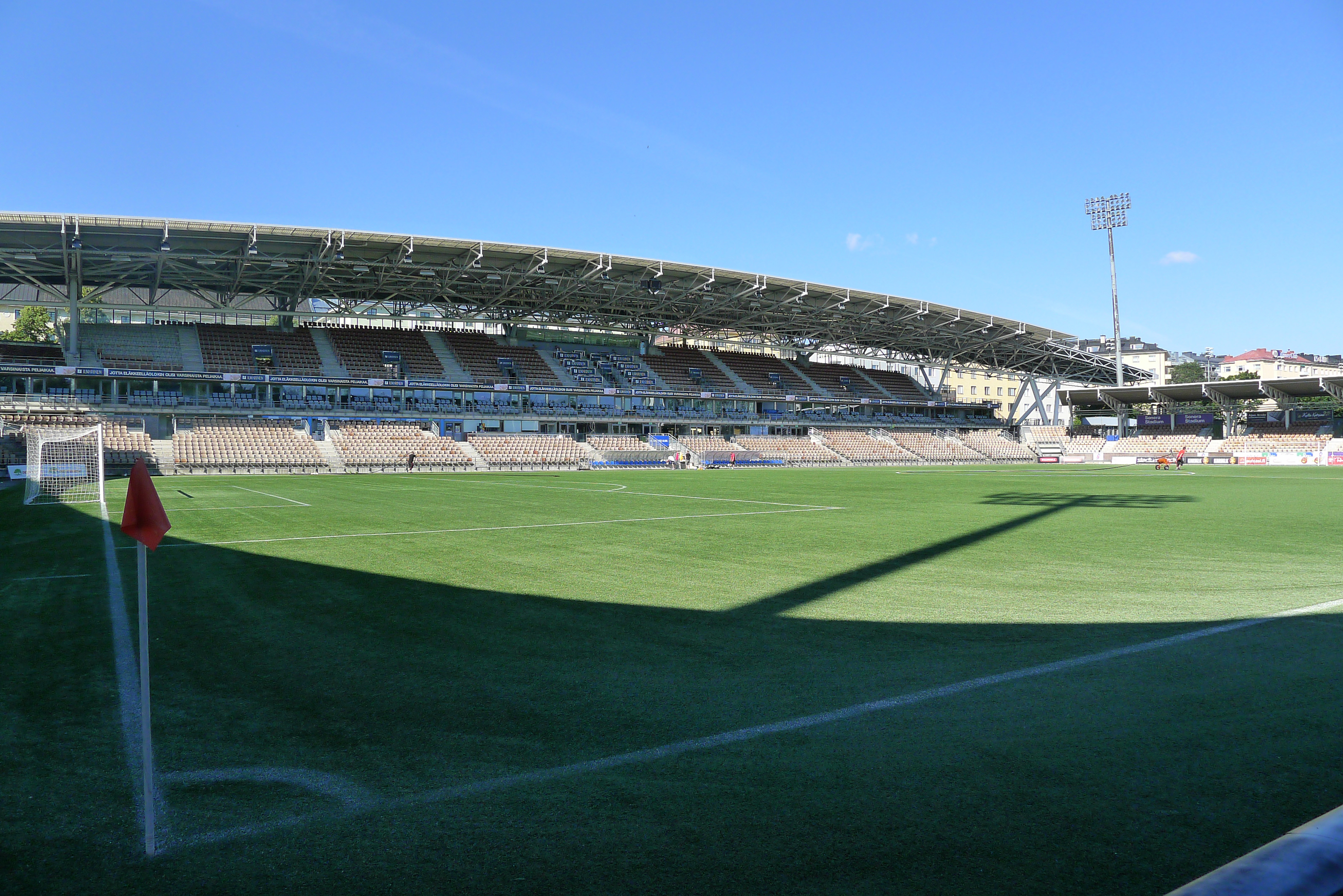 Sonera Stadium 22.7.2014